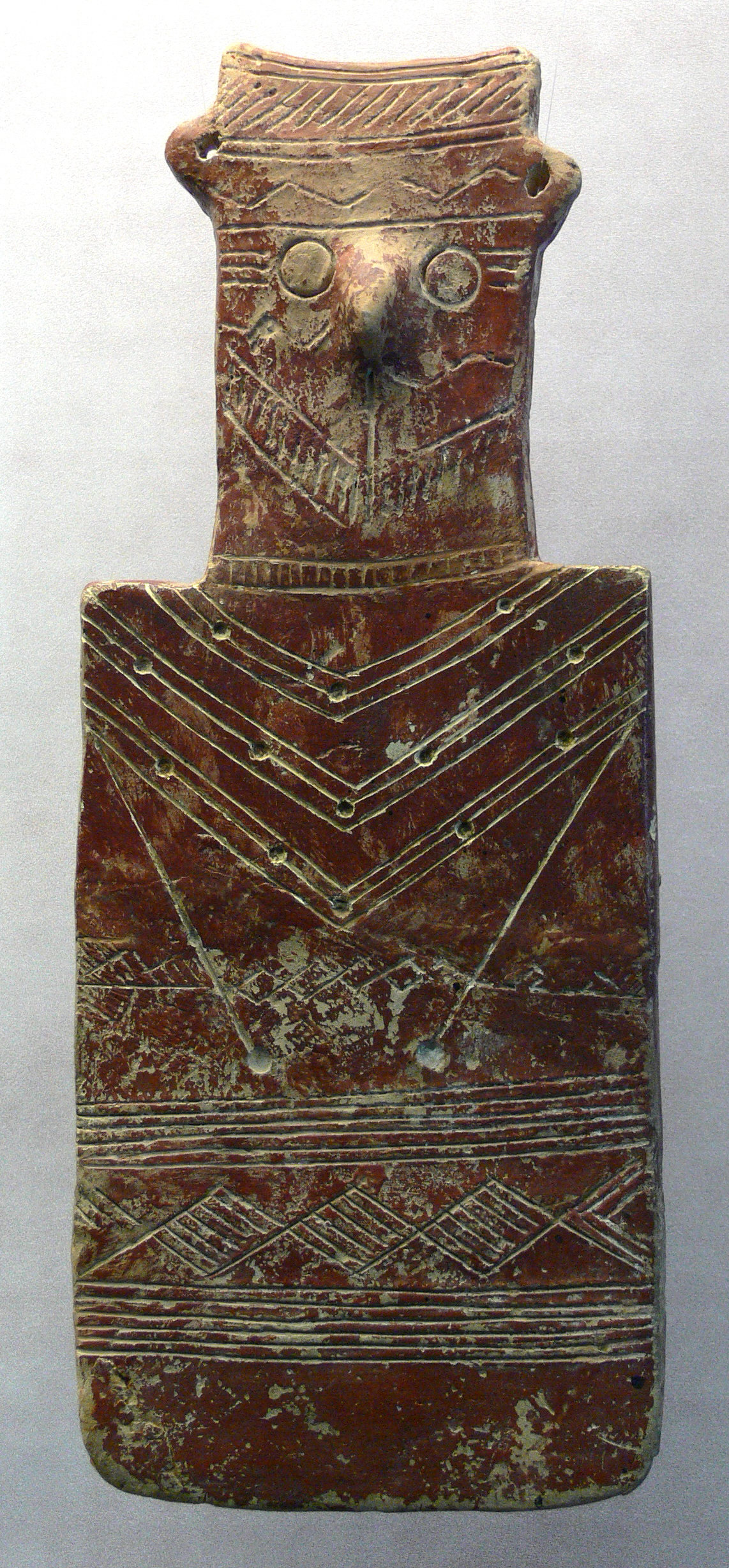 Schaffhausen, Museum zu Allerheiligen, Sammlung Ebnöther, (Abteilung "Idole") Brettidol, Zypern, frühe Bronze Zeit (2100–2000 v. Chr.), Ton (modelliert und geritzt); Höhe 27 cm